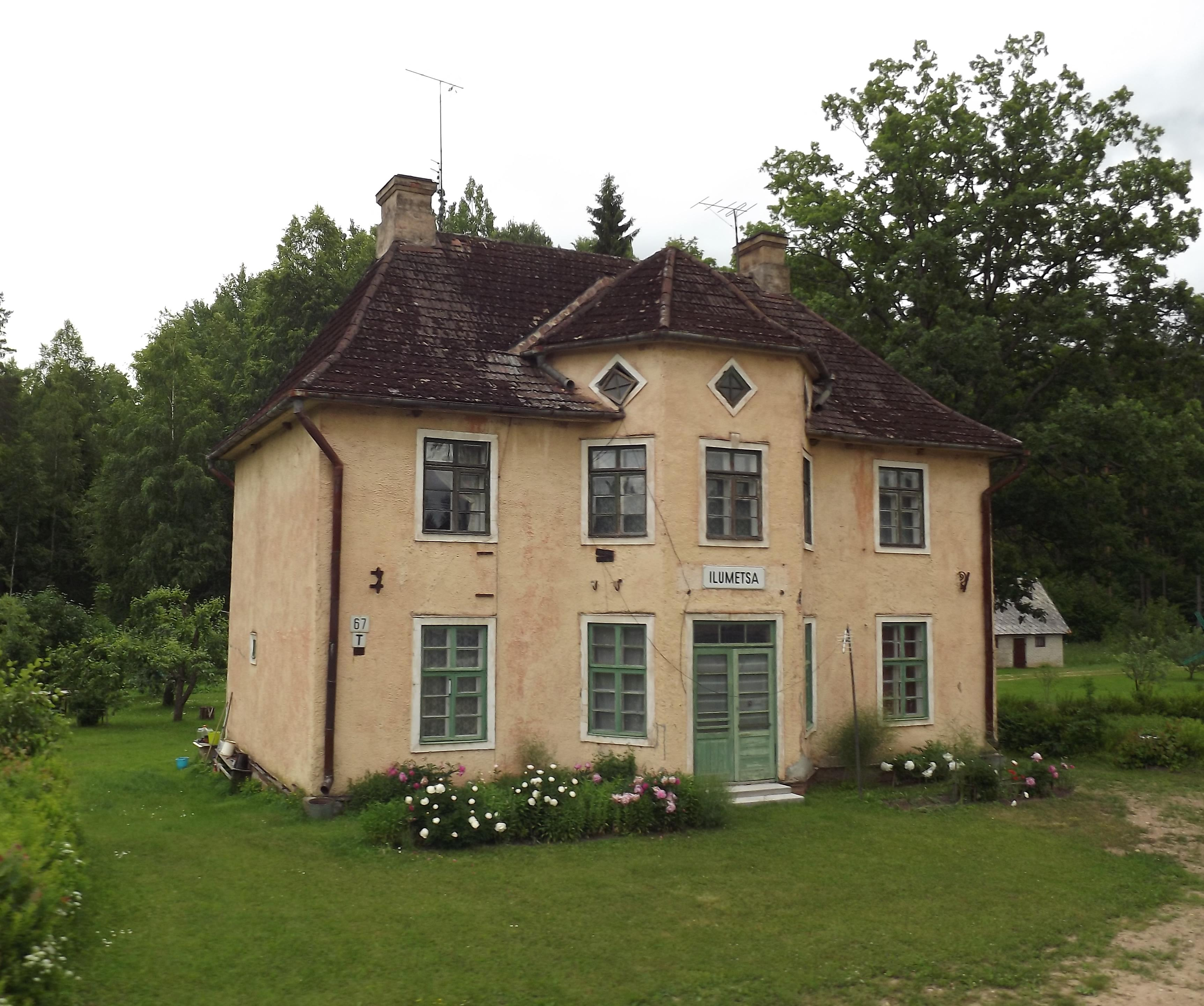 Ilumetsa jaamahoone